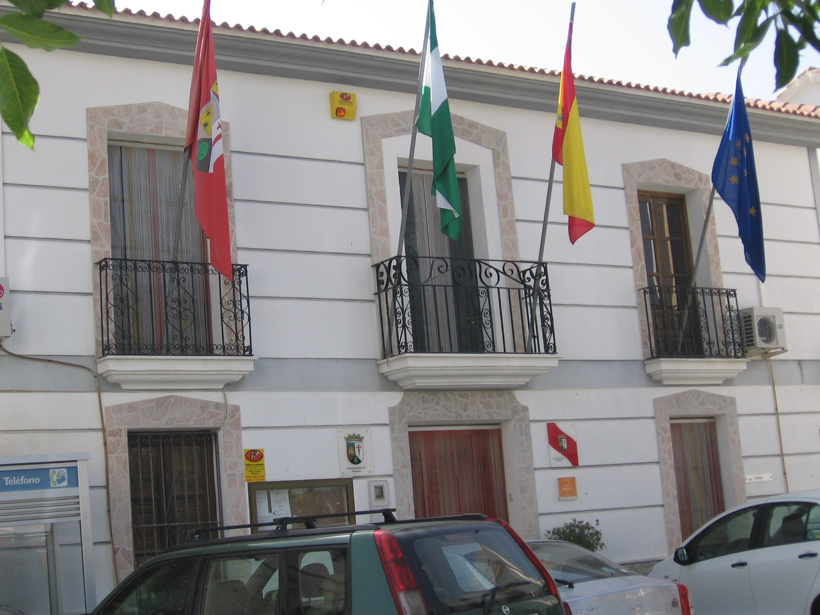 Ayuntamiento de Bacares, España.